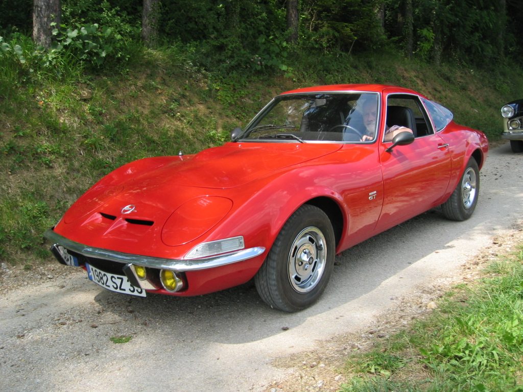 Opel GT 1900